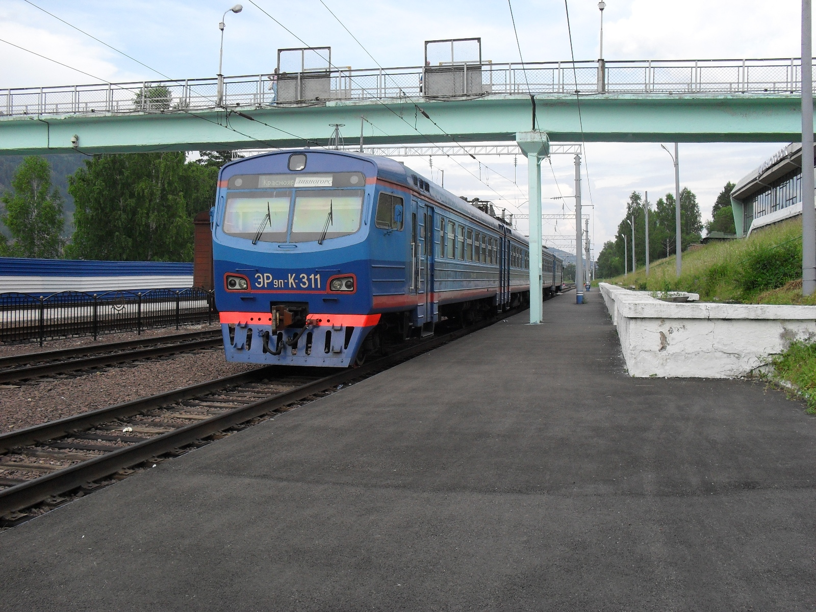 Электропоезд ЭР9ПК-311 на ст. Дивногорск